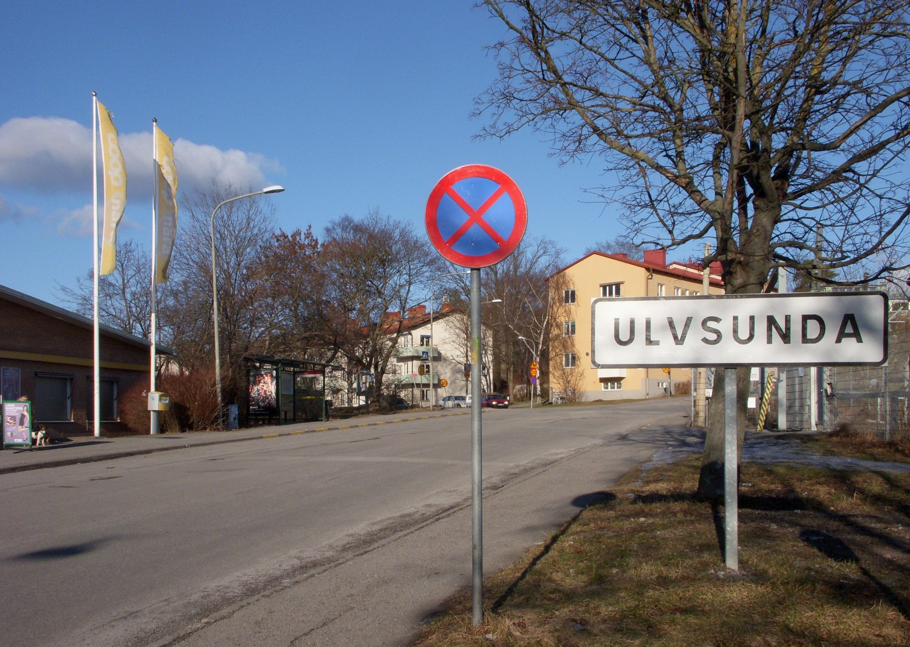 Ulvsunda